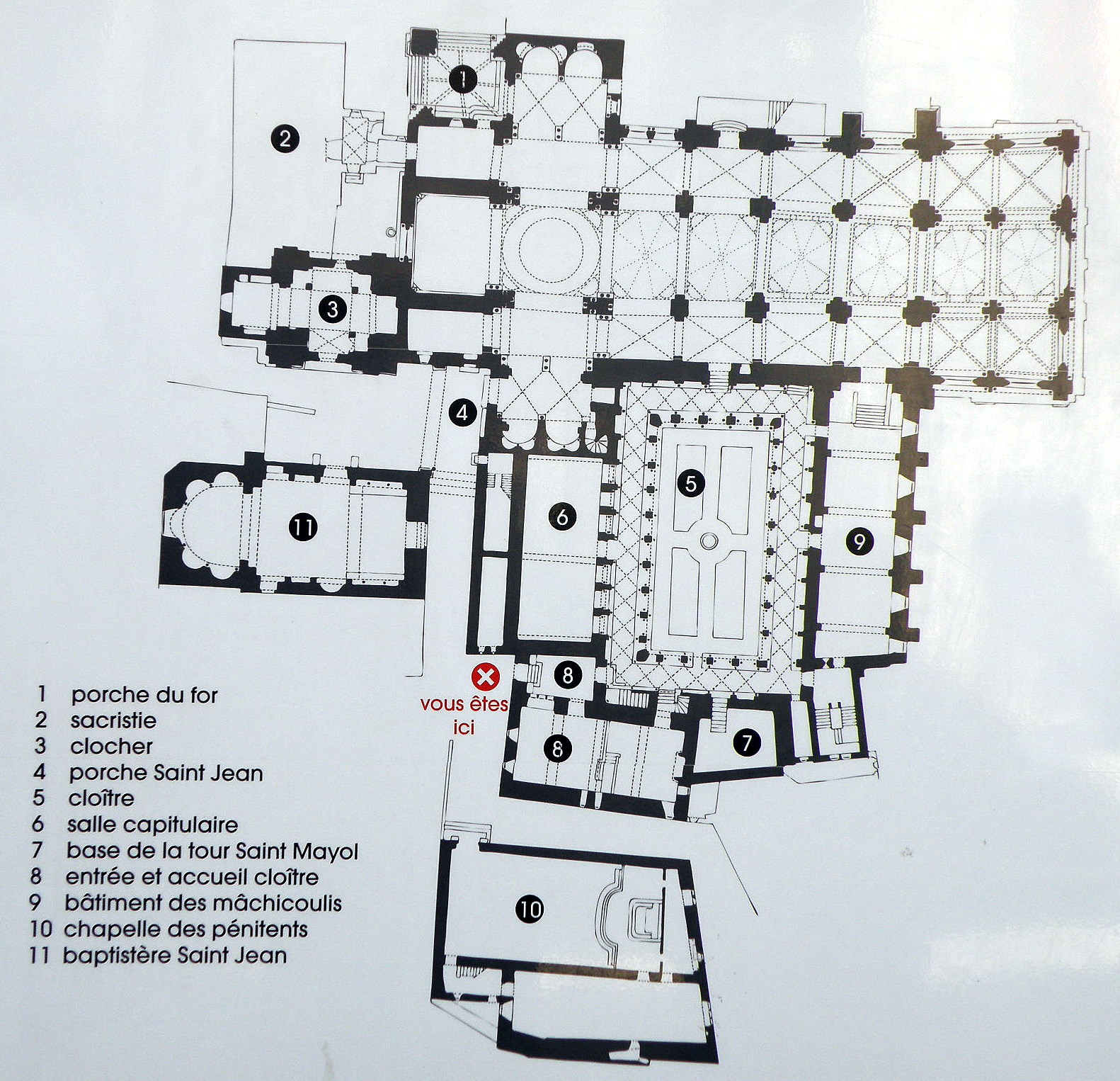 Le Puy-en-Velay (préf. de la Haute-Loire, France). Cathédrale Notre-Dame, plan de l'édifice, affiché à différents endroits dans et autour de la cathédrale. N.B.: l'est est à gauche, le nord en bas.